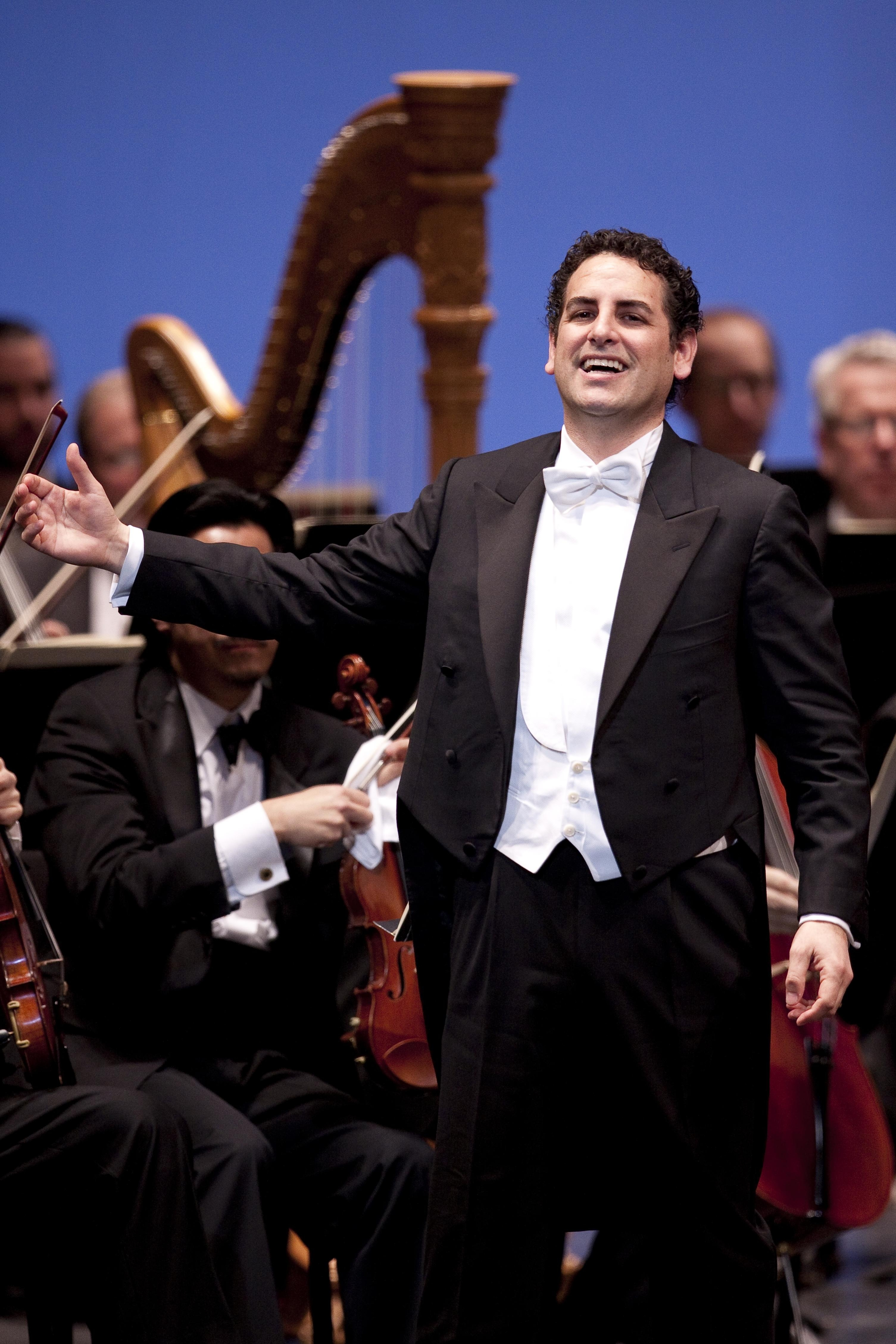 El tenor peruano Juan Diego Florez fue aclamado en el recital que ofreció en el National Opera House del Kennedy Center de Washington DC, donde cerró su presentación con la peruanísima “La Flor de la Canela”. La velada concluyó con una recepción en la residencia del Embajador del Perú en los Estados Unidos.